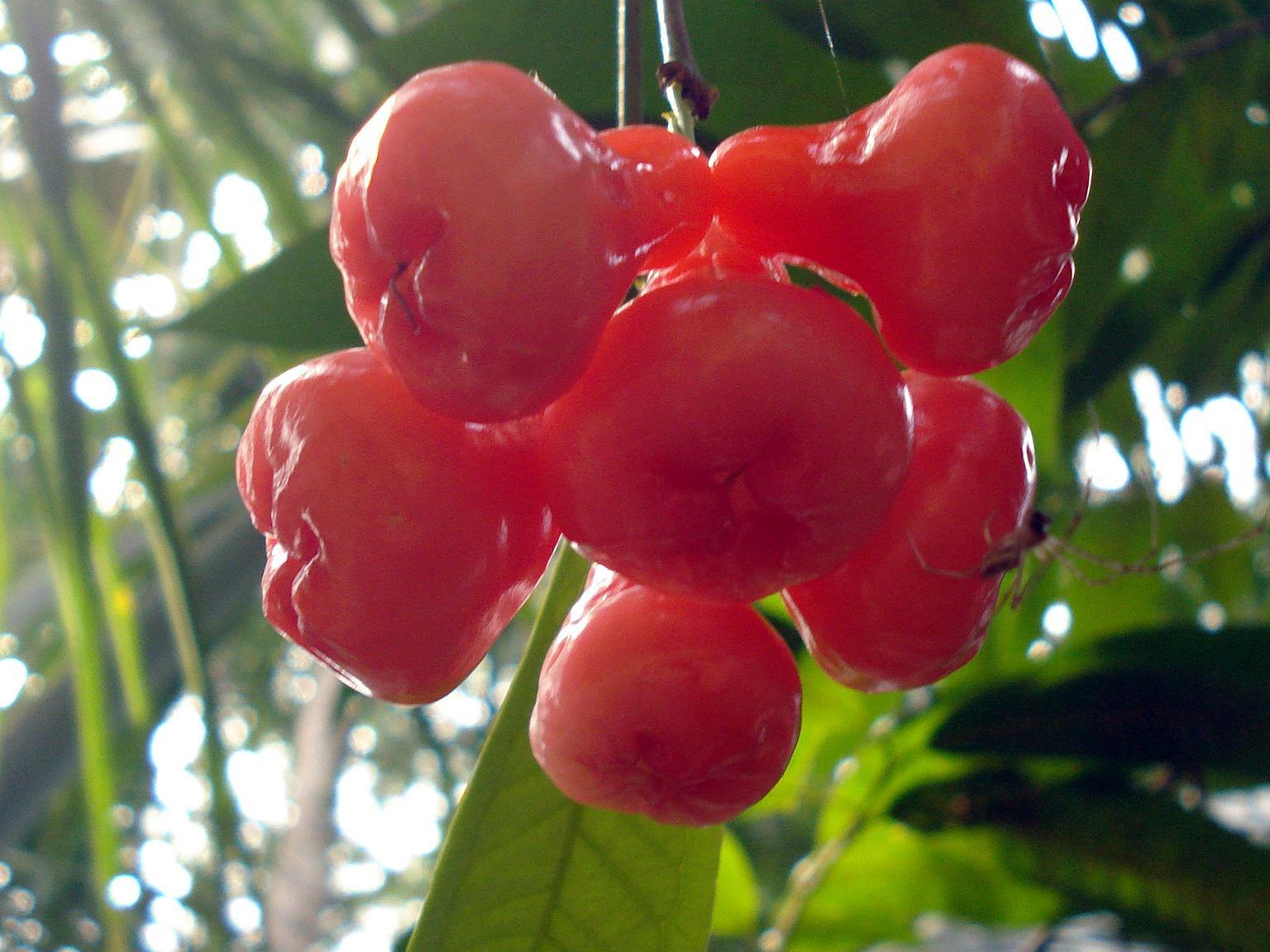 ചാമ്പക്ക Name : Eugenia javanica Family : Myrtaceae രുചിയുള്ള ഫലങ്ങൾ ലഭിക്കുന്ന ചെറുവൃക്ഷമാണ് ചാമ്പ (ജാമ്പ). ഇതിൽ നിന്നും ലഭിക്കുന്ന ചാമ്പക്ക തിന്നാൻ കുട്ടികൾ ഇഷ്ടപ്പെടുന്നു